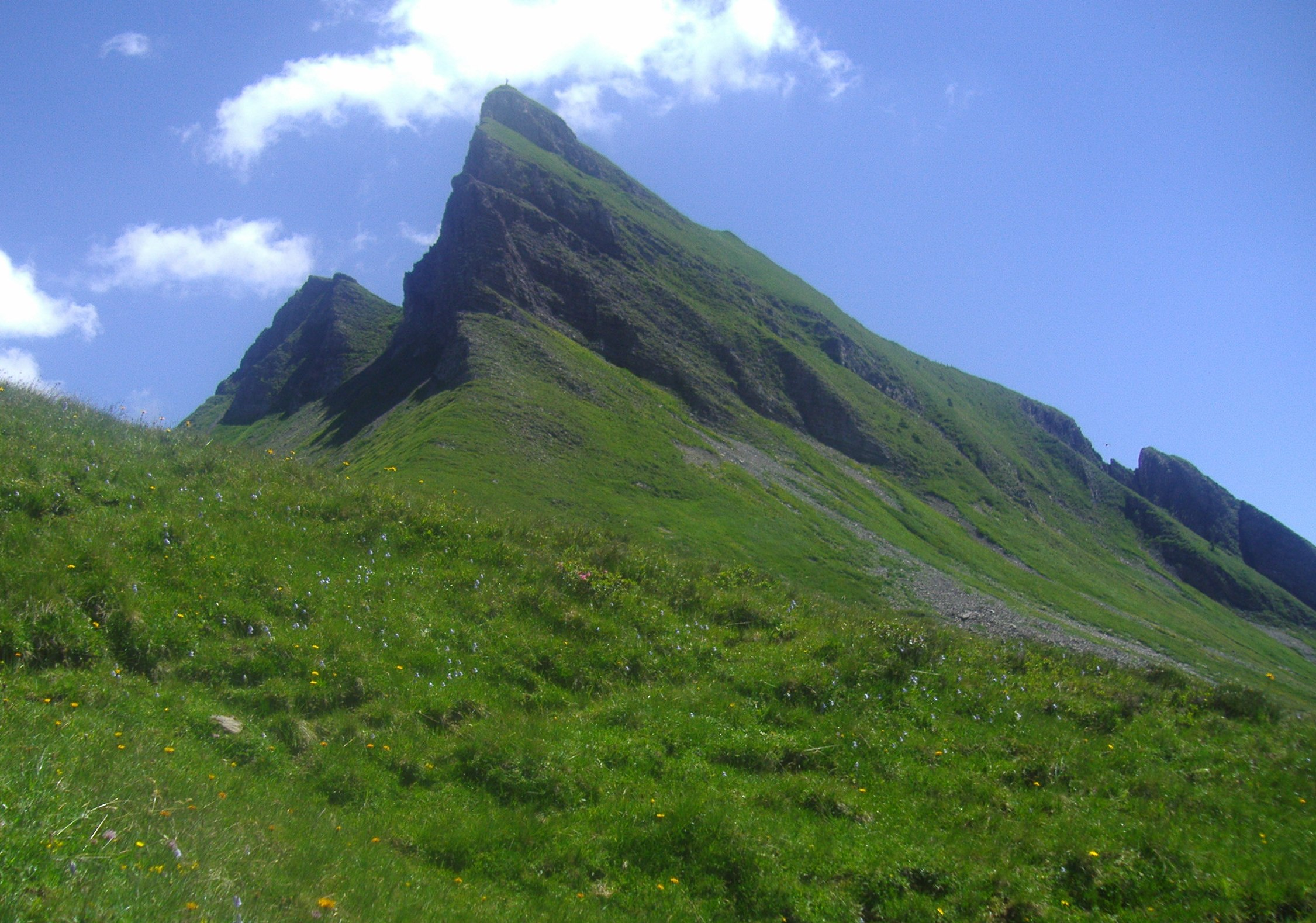 Die Westflanke der Damülser Mittagsspitze (2097 m) in Vorarlberg, aufgenommen wenig unterhalb der Graterhebung Hohes Licht (2009 m)